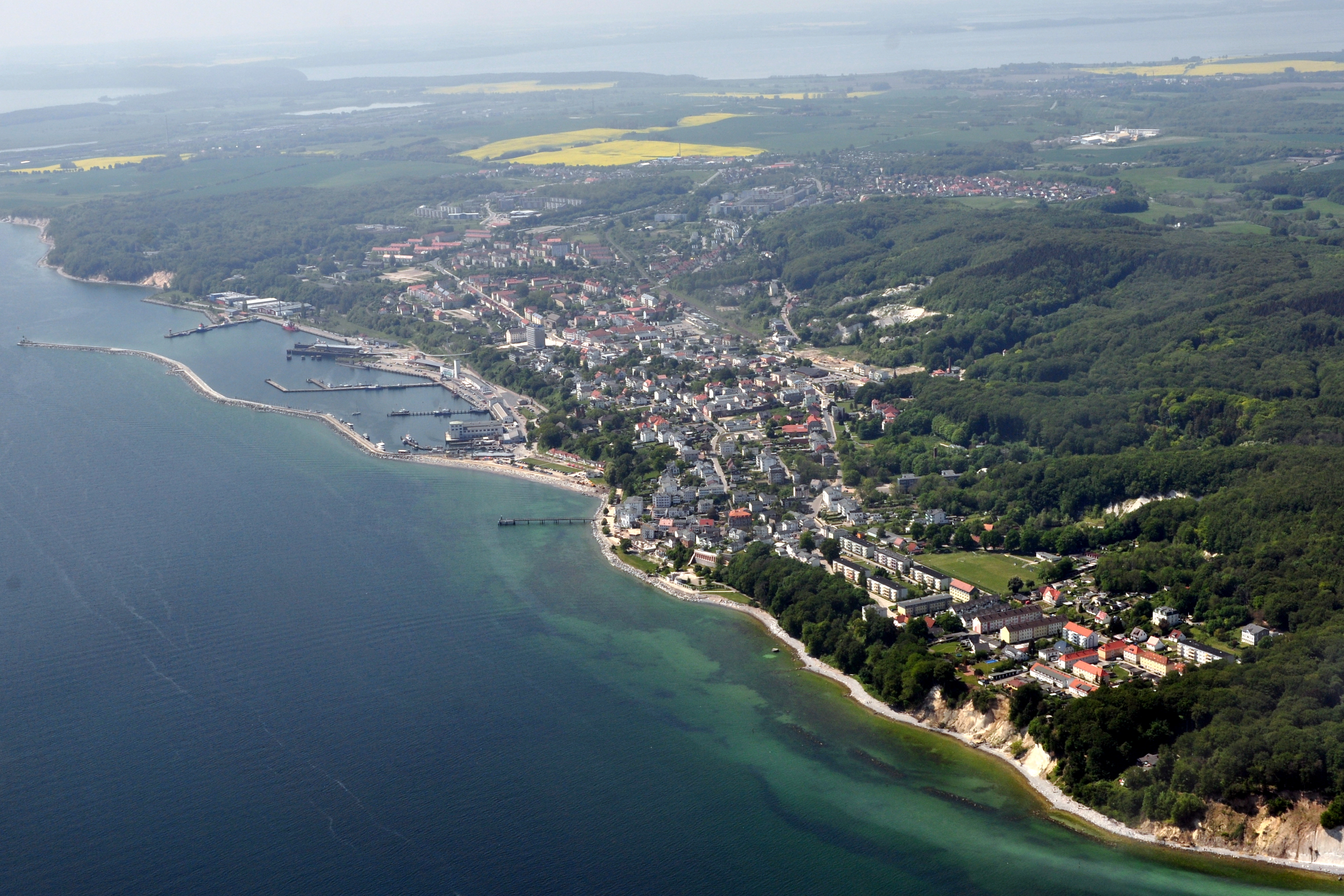 Die Bilder wurden von mir während eines einstündigen Rundflugs ab Flugplatz Güttin am 21. Mai 2011 aufgenommen. Die Bildbeschreibung steht im Dateinamen. Aufgenommen mit einer Nikon D5000 durch das Seitenfenster des Flugzeugs.